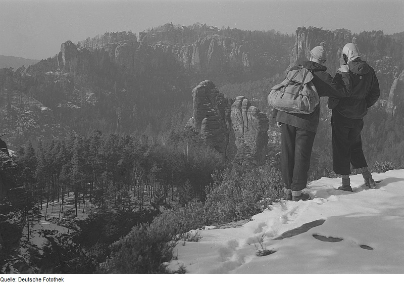 Original image description from the Deutsche Fotothek Blick vom Honigsteinmassiv zum Talwächter und Basteimassiv